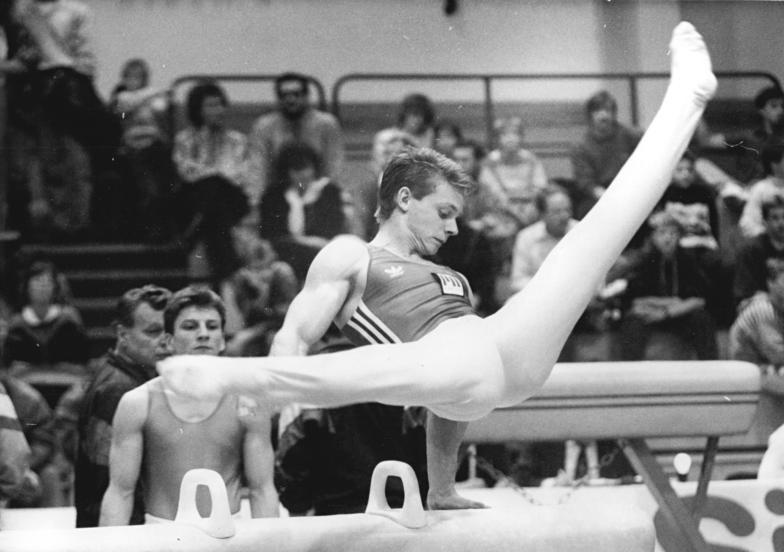 Berlin, Andreas Wecker ADN-Bernd Settnik 15.12.90 Berlin: Turnen-Deutschland-Cup In souveräner Manier brachte Andreas Wecker - hier mit fliegenden Scharen am Pauschenpferd - in der Saefkow-Halle den Deutschland-Pokal der Turner in seinen Besitz. der 20jährige WM-Vierte vom SC Berlin absolvierte den Zwölfkampf mit 115,15 Punkten und behauptete sich damit überlegen vor der Konkurrenz. Abgebildete Personen: Wecker, Andreas: Leichtathlet, Turner, SC Dynamo Berlin, Olympiateilnehmer 1988, DDR